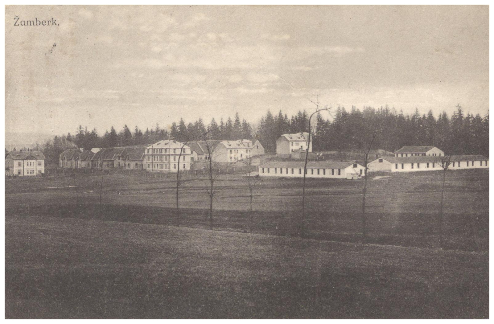 Kasárna v Žamberku (CZ) na Lukavské ulici; Barracks in Lukavská street in Žamberk (CZ)